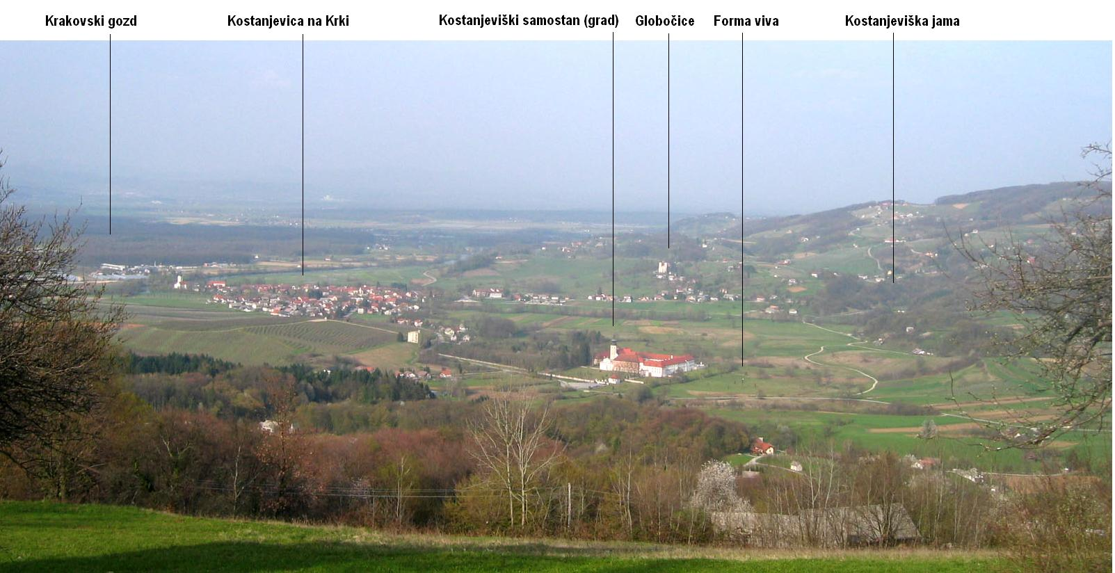 Kostanjevica na Krki, Slovenia (panorama) -part of Dolenjska region photo:Ziga 07:48, 2 April 2007 (UTC)